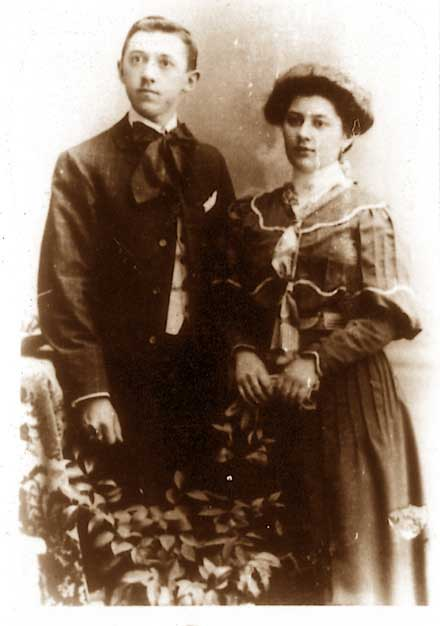 Аптекарот Милан Генов со неговата сопруга Кате сликани на почетокот на 20 век